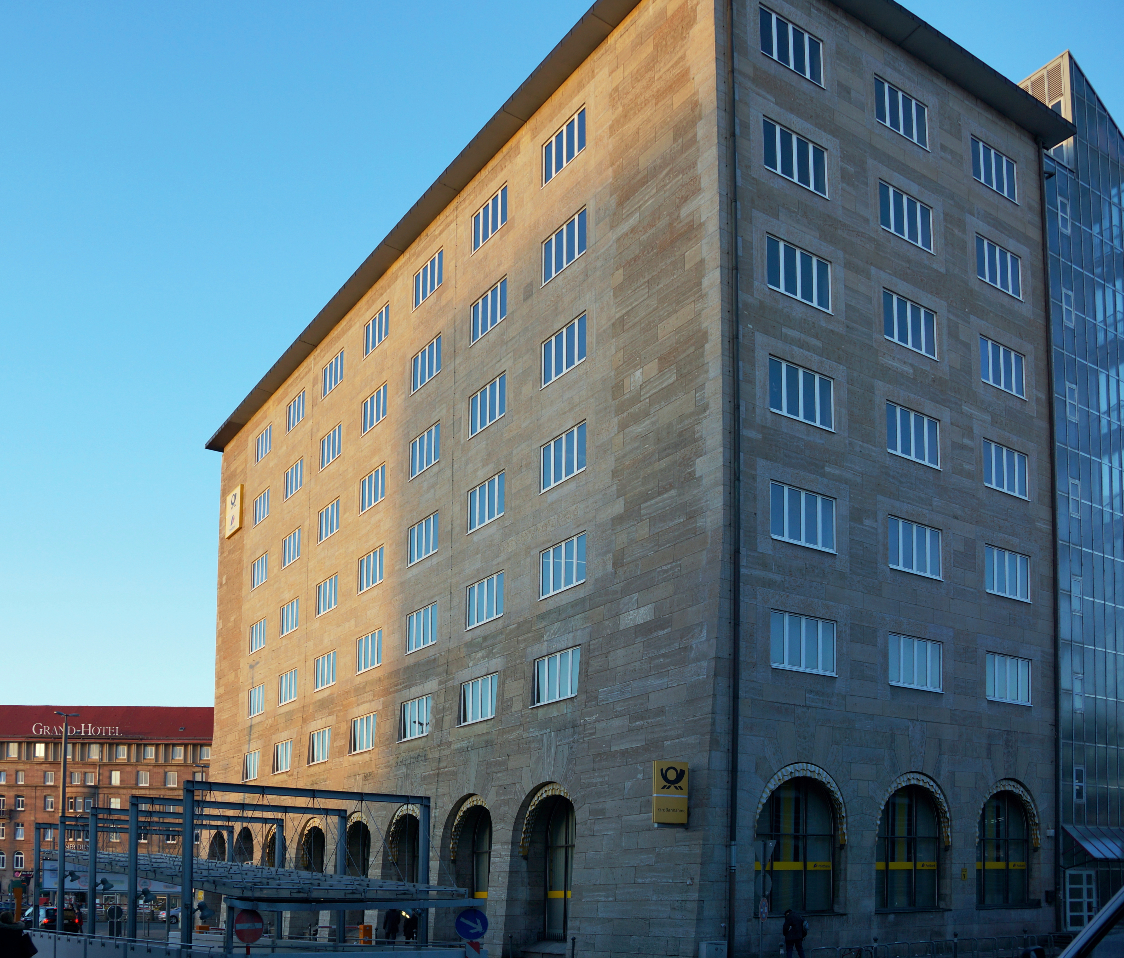 Die ehemalige Hauptpost am Hauptbahnhof in Nürnberg